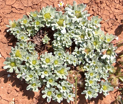 Evax pigmaea